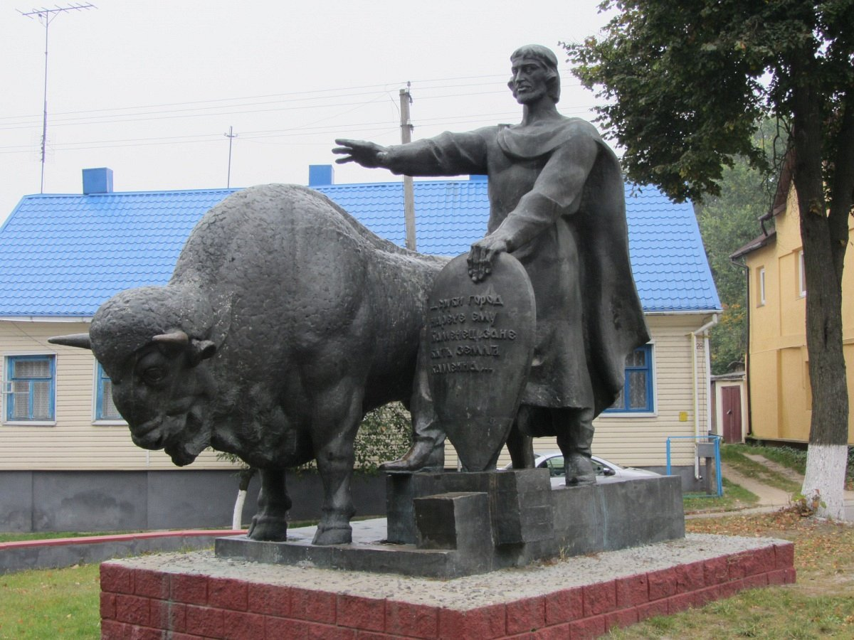 Краявіды Камянца